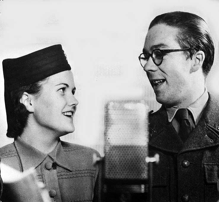 Lisbeth Bodin och Henry Lindblom